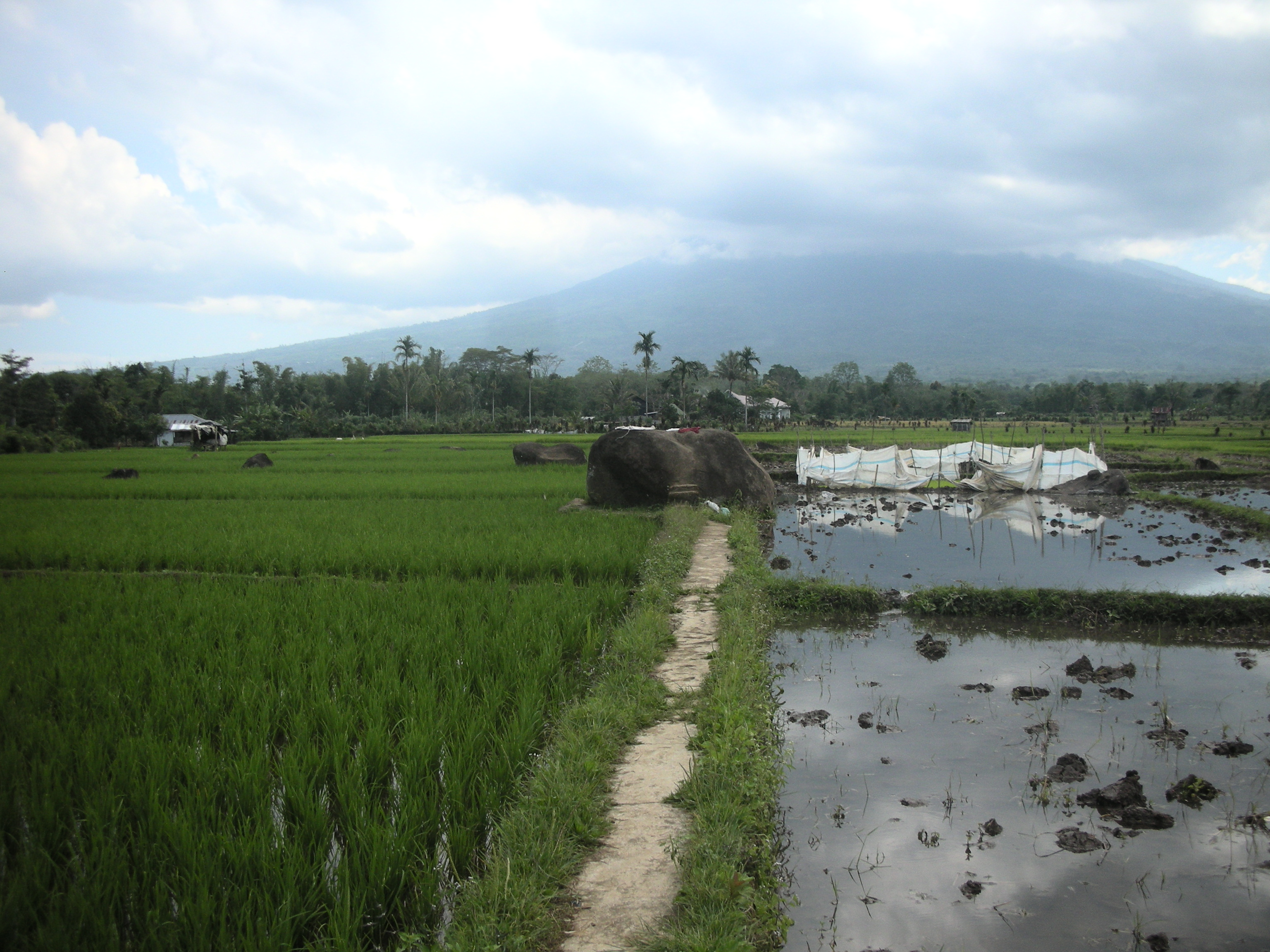 Komplek Megalitik Tanjungaro, Lahat, Sumatra Selatan